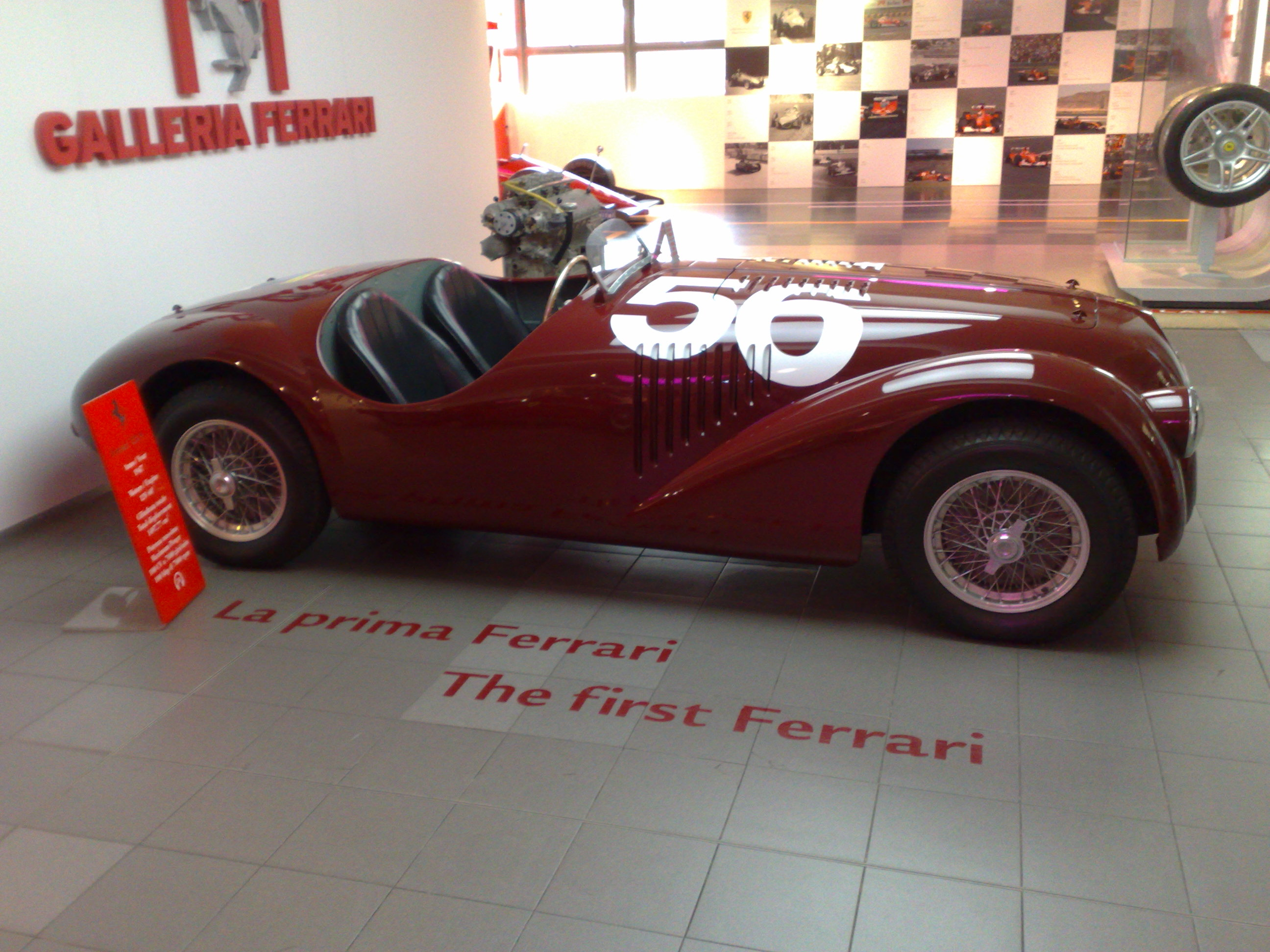 Replica di una Ferrai 125 S esposta alla Galleria Ferrari di Maranello